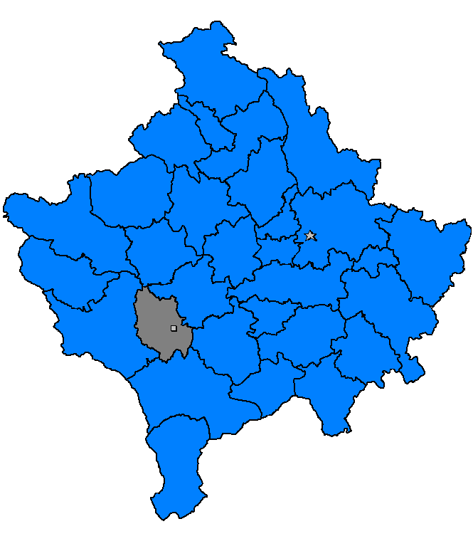 Rahovec, Kosovë 2006